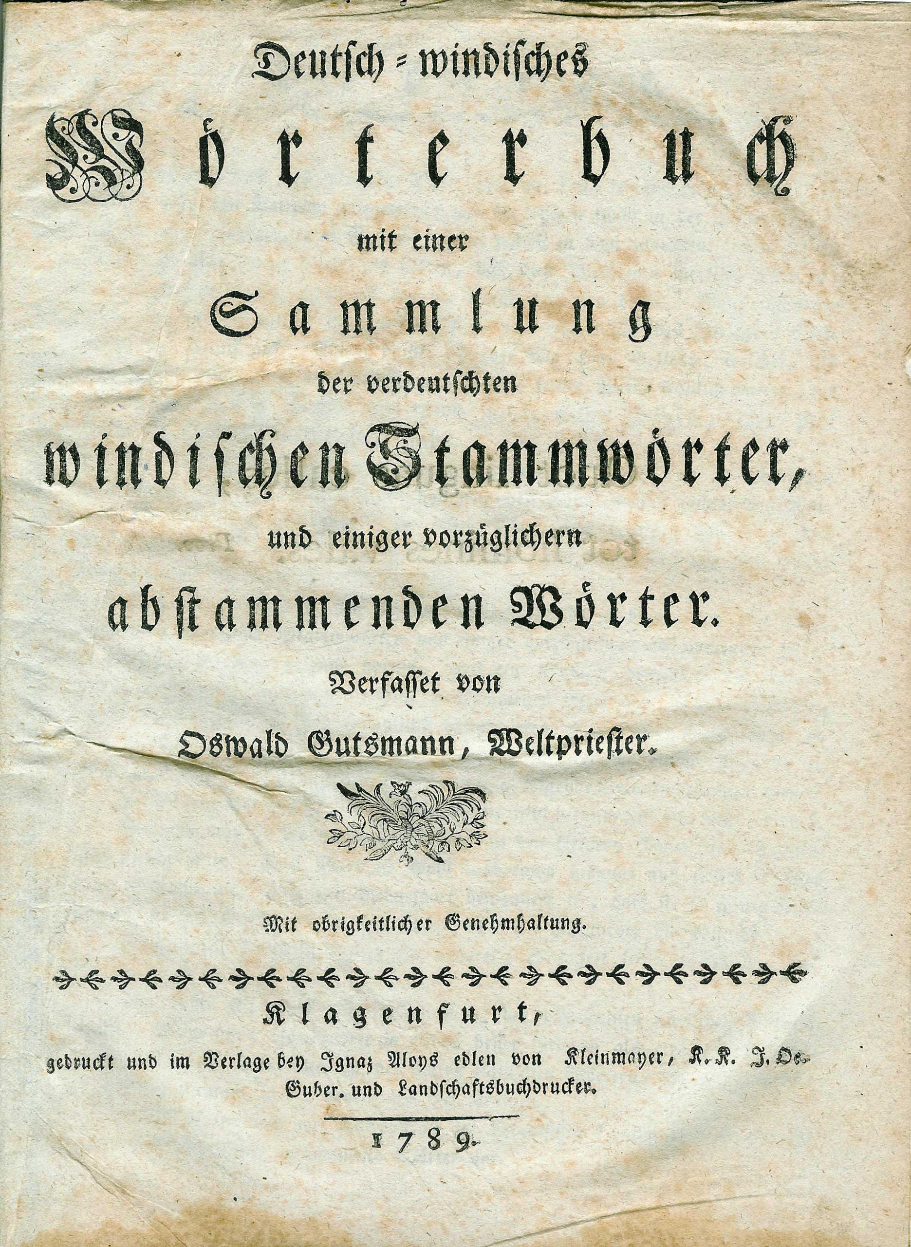 Deutsch - Windisches Woerterbuch, frontpage